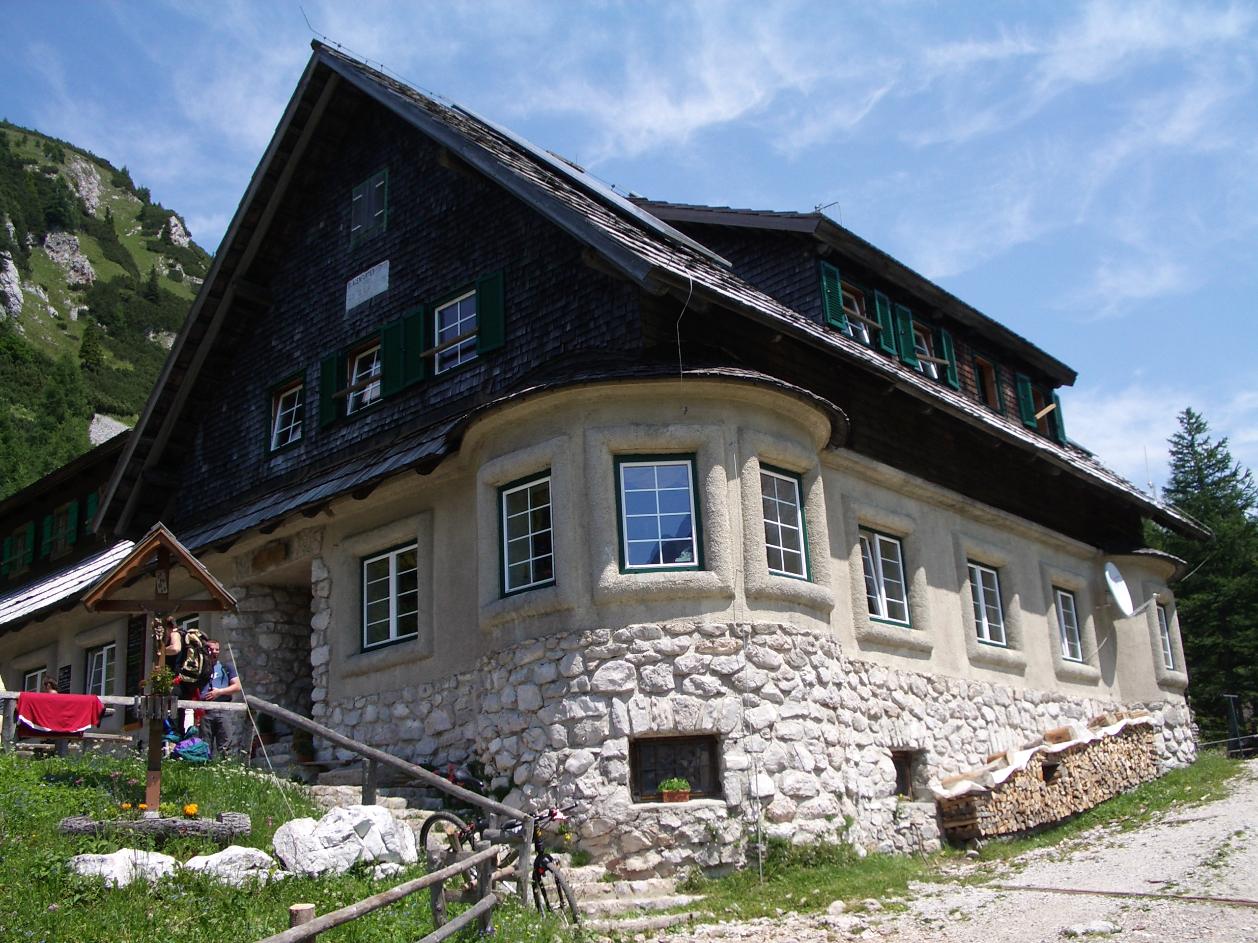 Die Klagenfurter Huette in den Alpen. Foto: E. Pirker